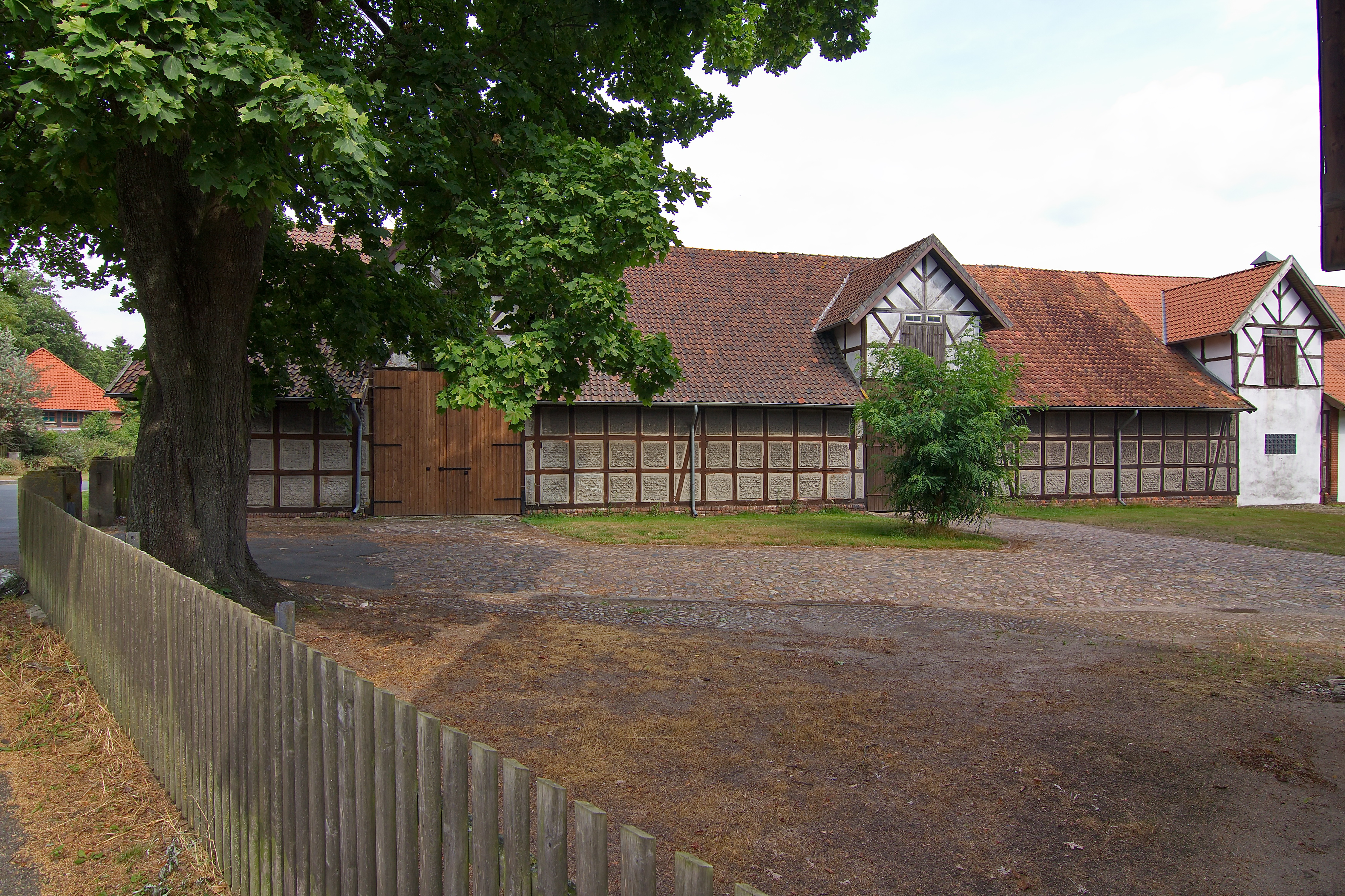 Das Baudenkmal Alter Posthof am Amboßweg 10 in Schillerslage (Burgdorf) wurde 1784 errichtet. Es ist das Geburtshaus von Philipp Carl Sprengel (1787 - 1859). Der Postkutschenbetrieb wurde 1860 eingestellt.